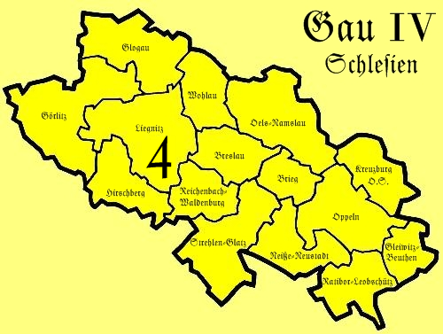 Gauliga Schlesien. Other vesions